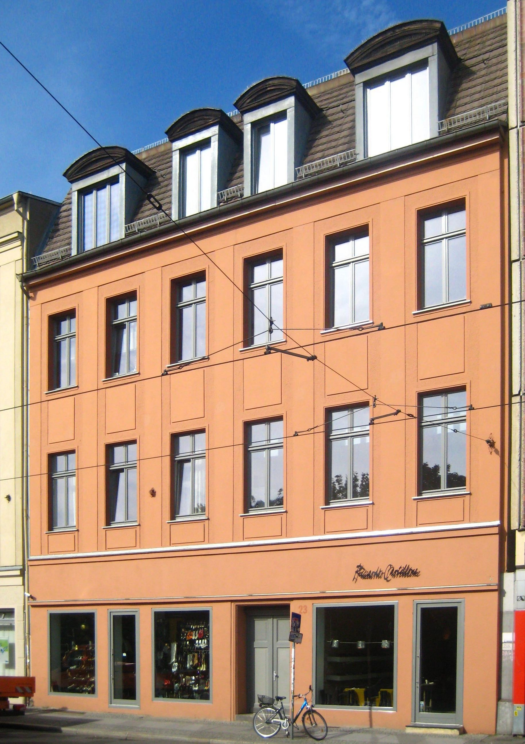 Mietshaus in der Rosenthaler Straße 23 in Berlin-Mitte, erbaut 1878. Das Gebäude ist als Teil des Bauensembles Spandauer Vorstadt denkmalgeschützt.